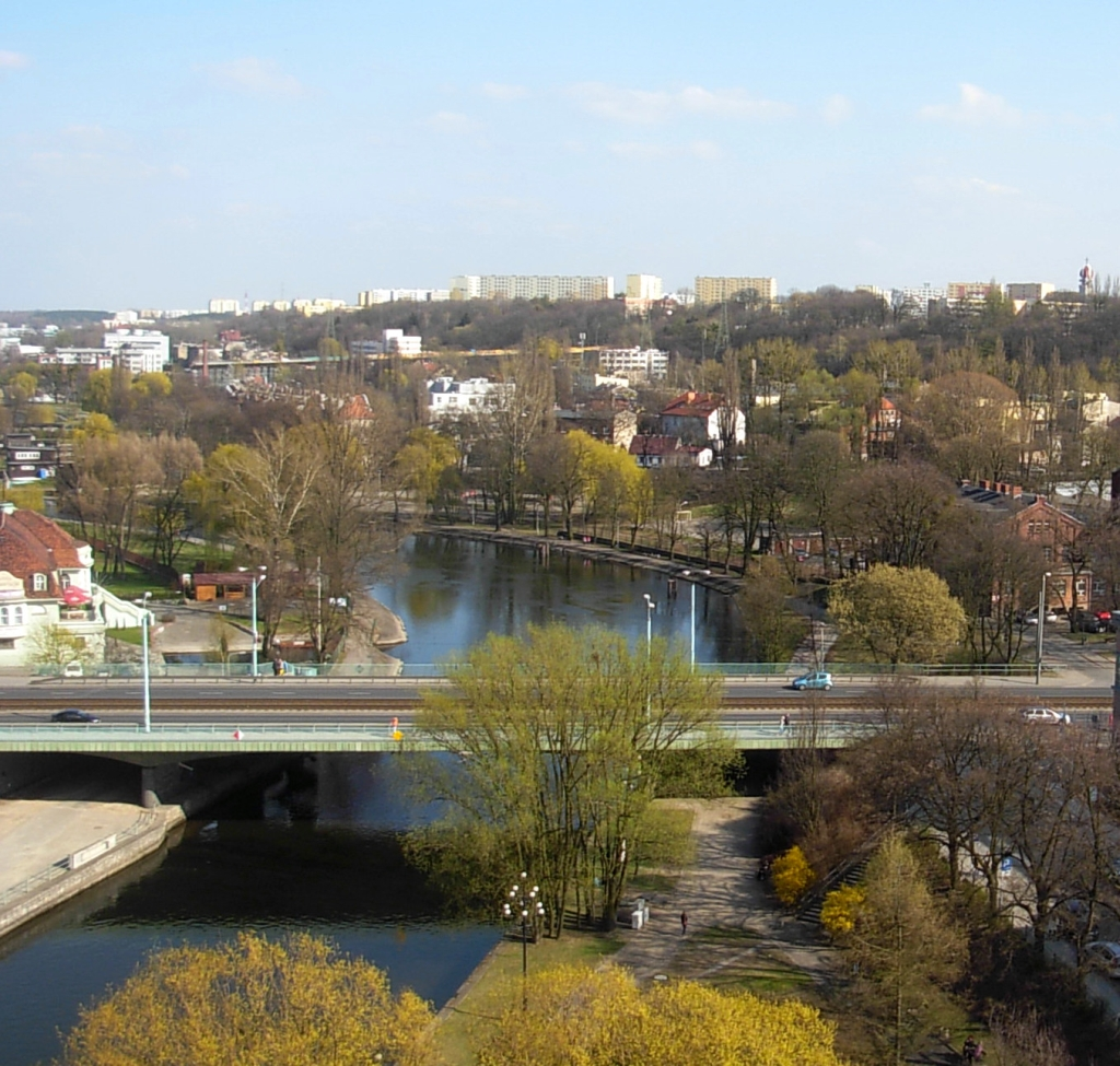 Brda w Bydgoszczy, most Bernardyński